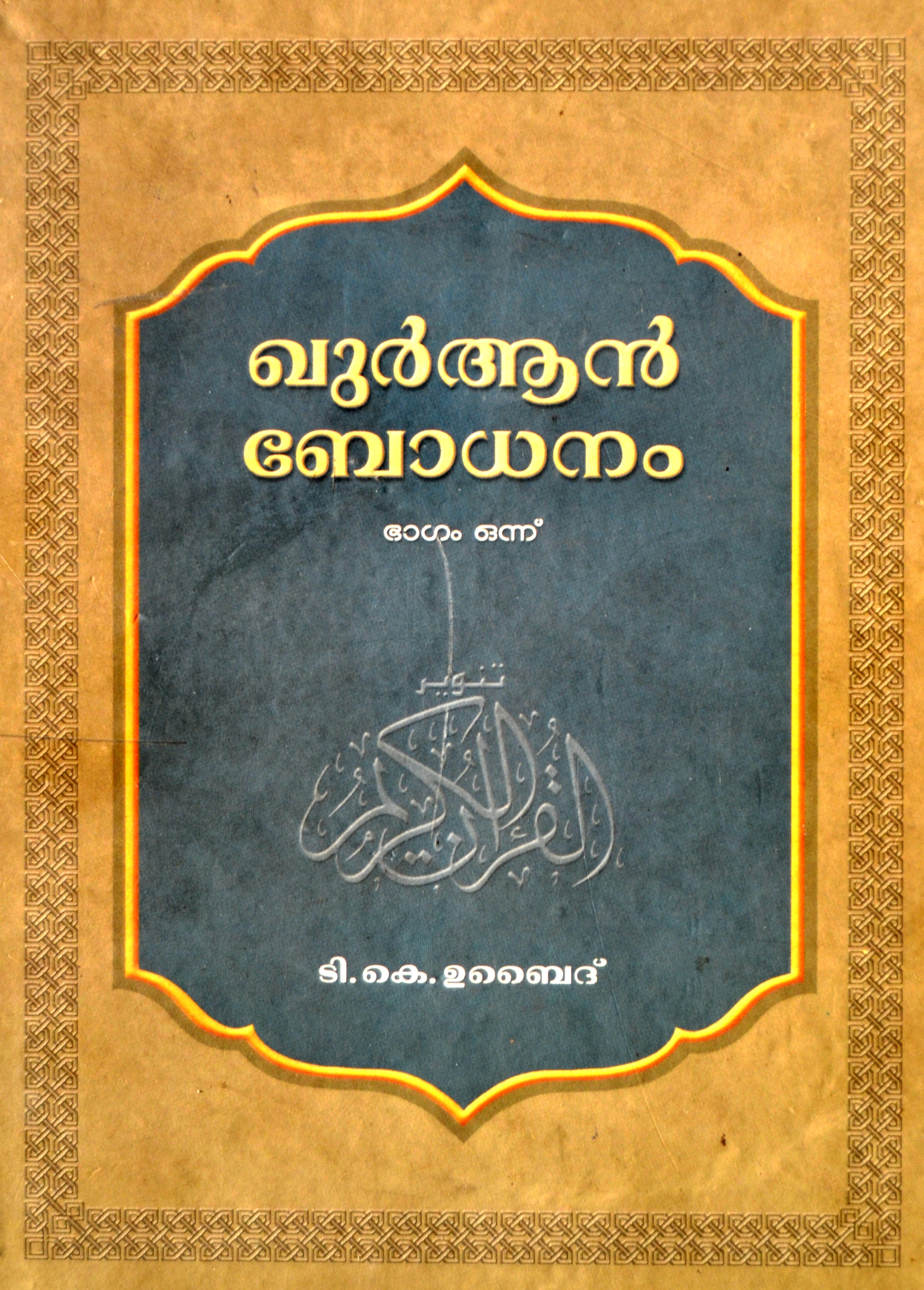 ഖുർആൻ ബോധനം.